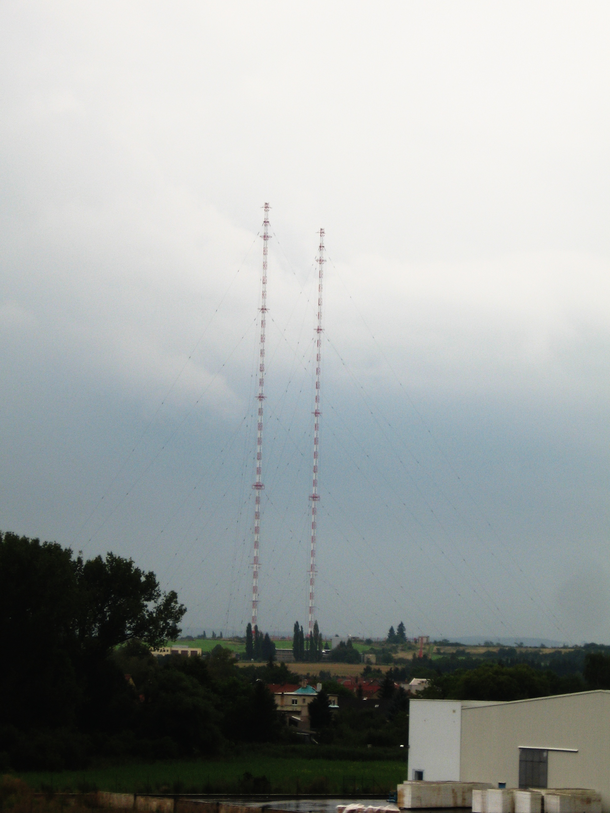 Vysílač Liblice z okna jedoucího vlaku